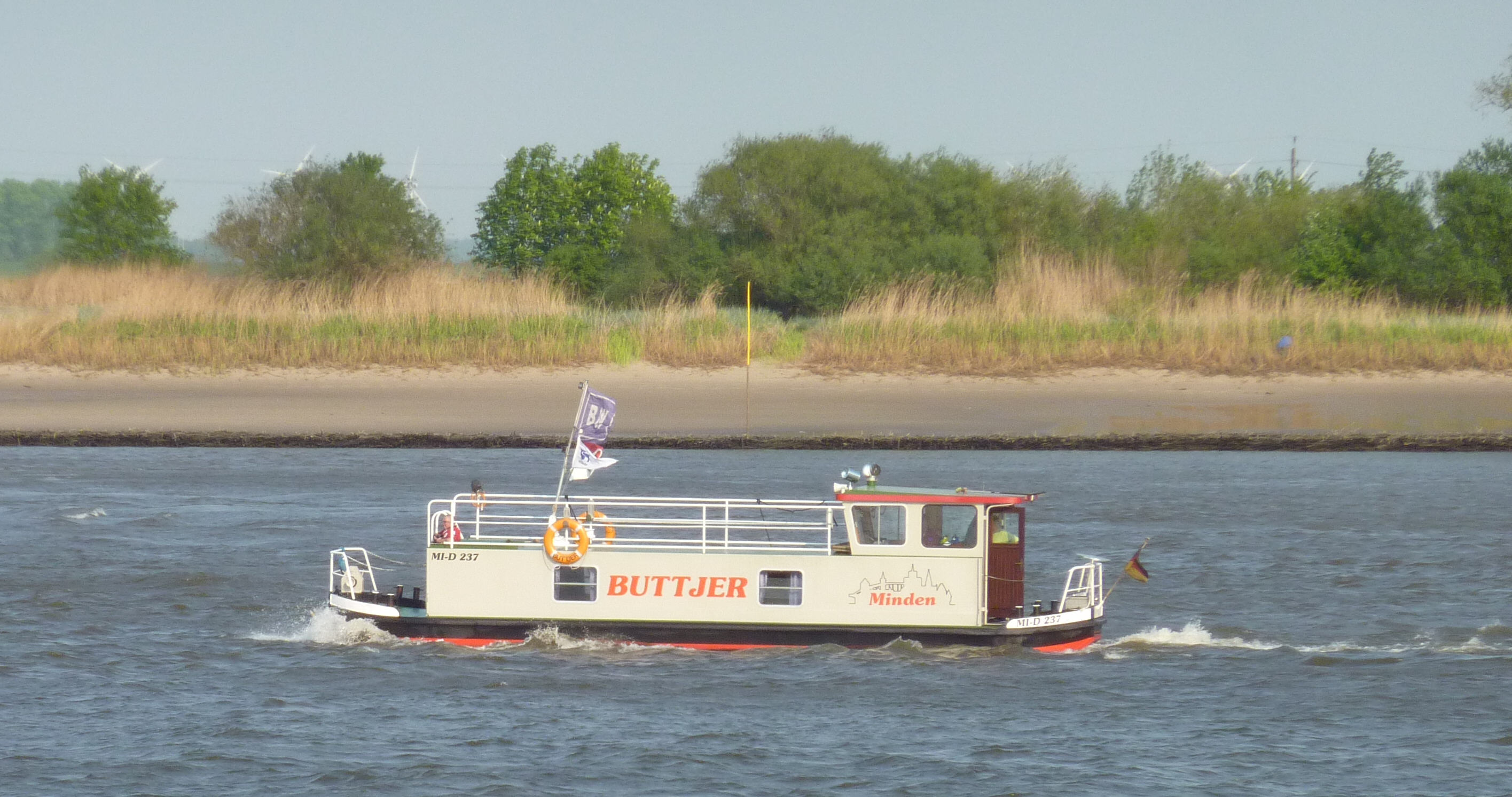 "Buttjer" auf der Weser bei Brake